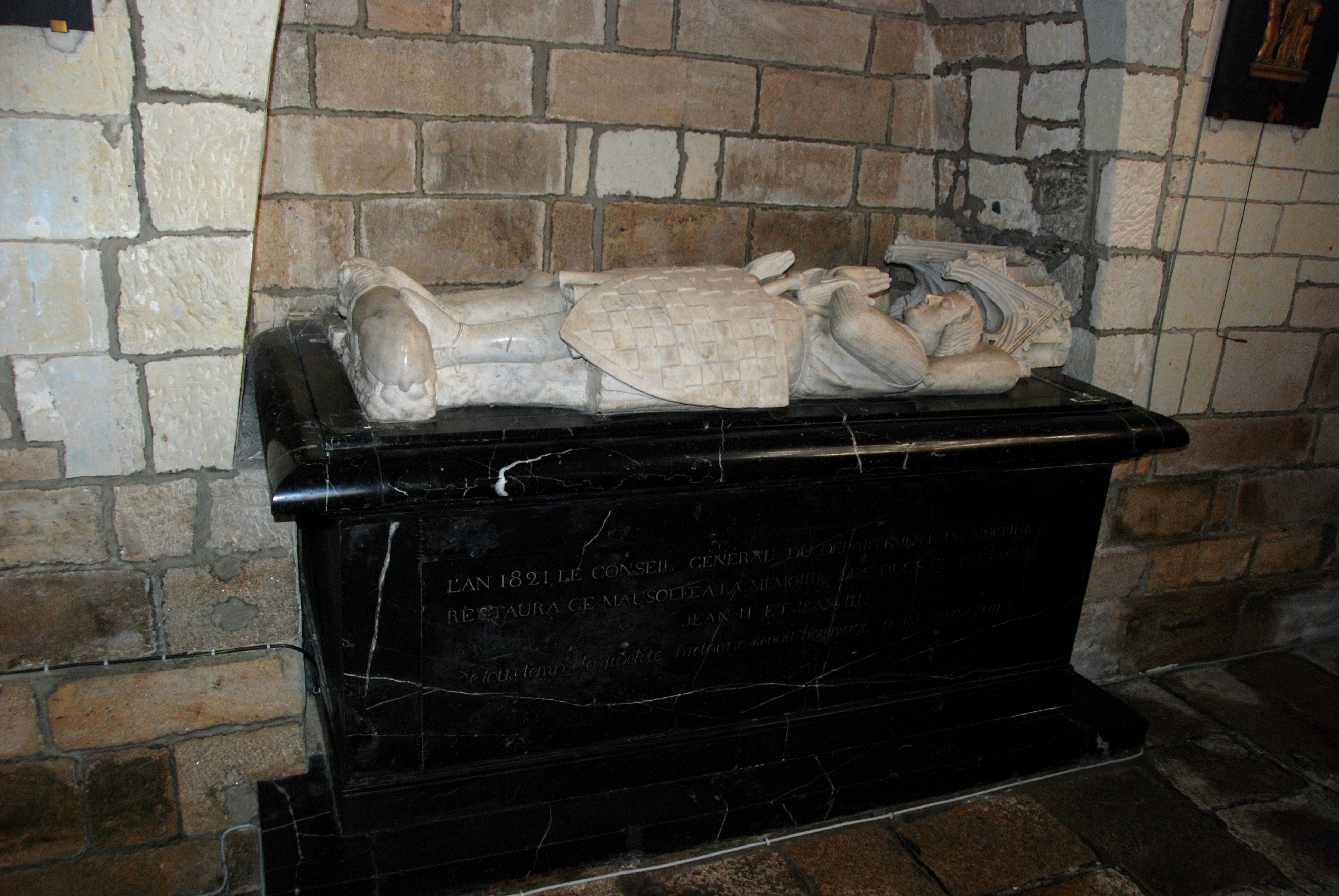 Tombeau des ducs de Bretagne : Jean II (1305) et Jean III, son petit fils (1341) - Statues en marble blanc du XIVème.